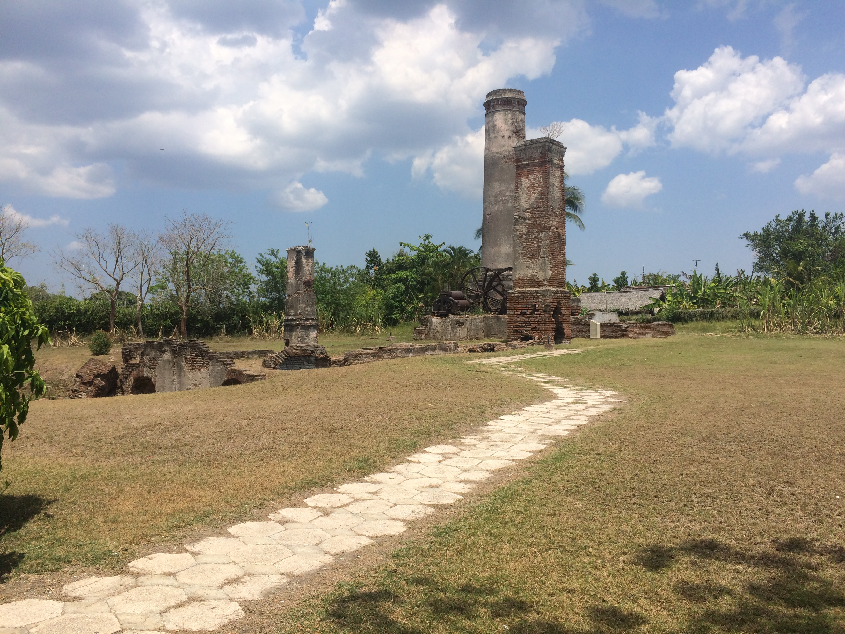 Minas, Cuba